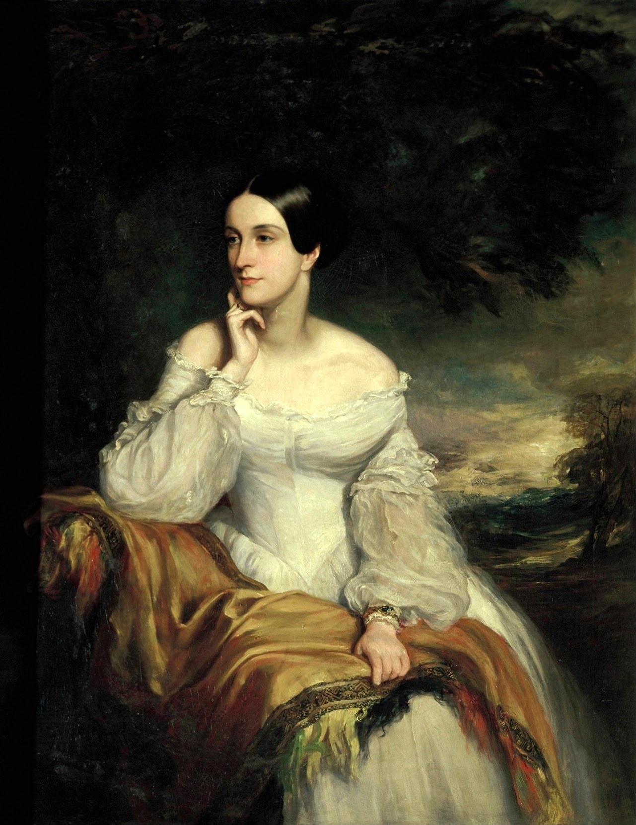 Charlotte Strachan war die Ehefrau des Grafen Emanuel Zichy-Ferraris (* 1808, † 1877); nach einem Gemälde des Malers Francis Grant (1803 - 1878)